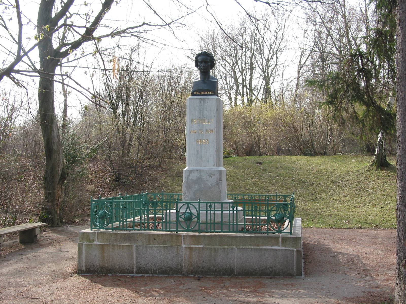 Statue of Ludwig van Beethoven